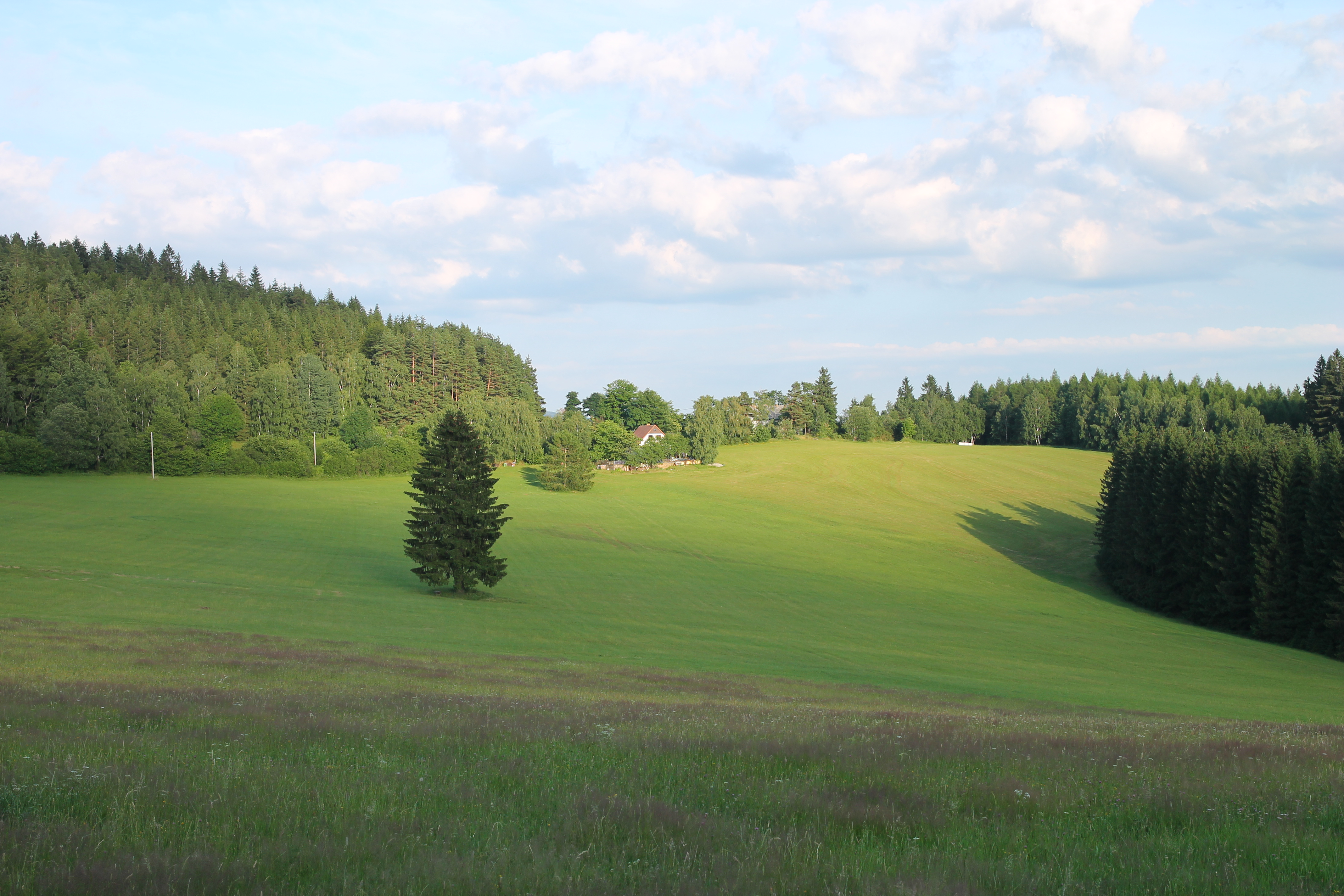 Škarez 1. díl, pohled od 2. dílu